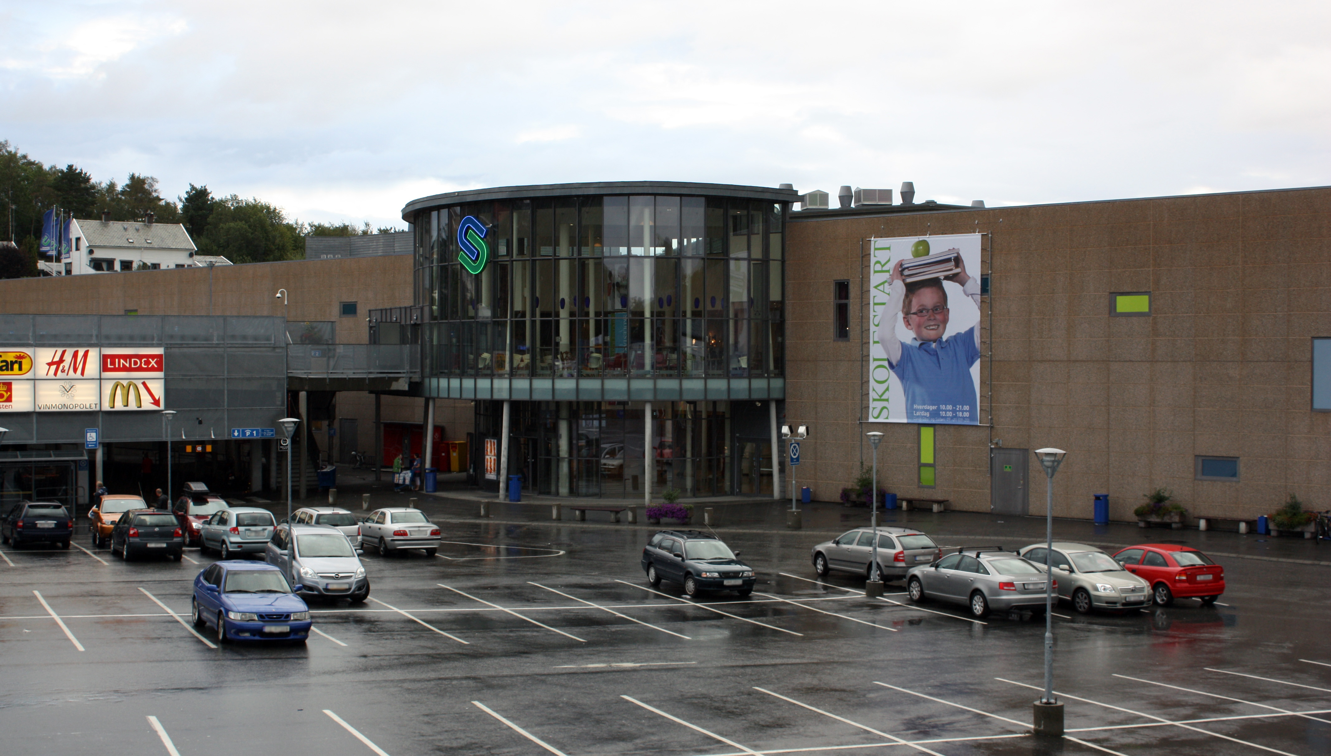 Lagunen Storsenter in Bergen, main entrance